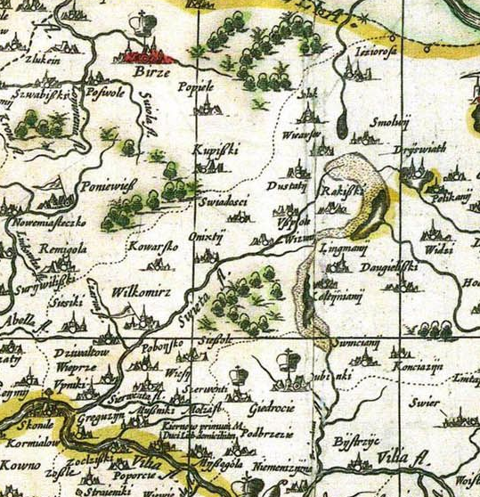 MAGNI DUCATUS CAETERARUMQUE REGIONUM ILLI ADIACENTIUM EXACTA DESCRIPTIO